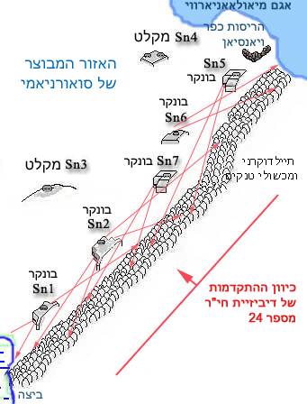 לבקשת גילגמש התמונה מעותקת ברשות מהאתר הזה - [1]